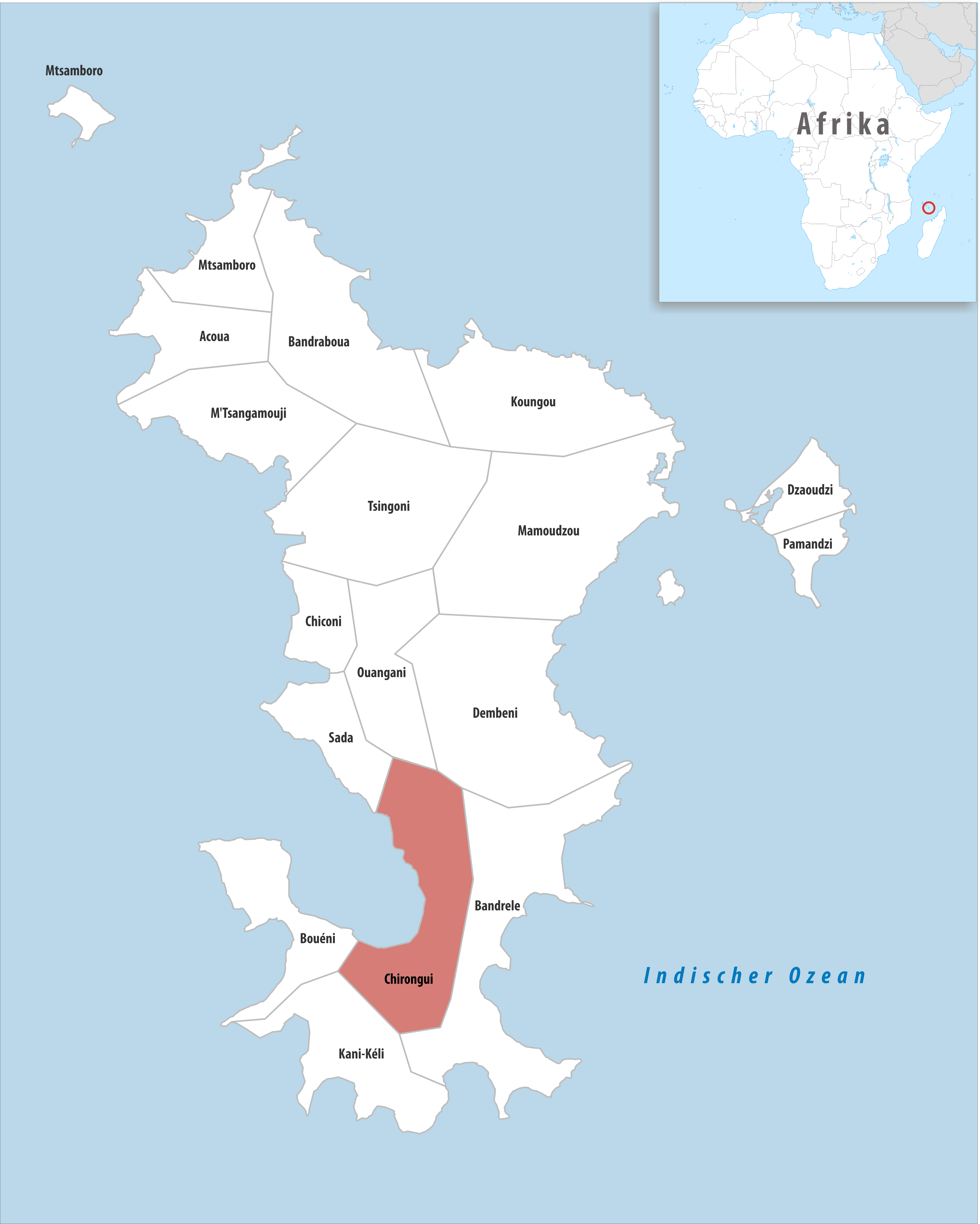 Lage der Gemeinde Chirongui